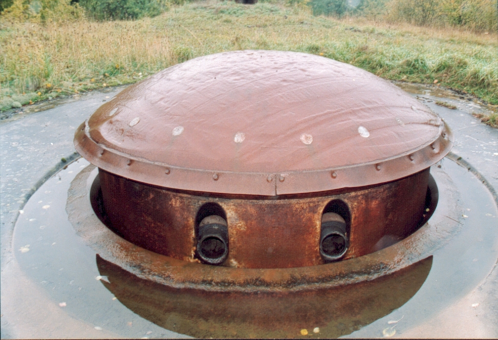 13,5 cm Haubitze, Artilleriewerk Anzeling, Block 5, Maginot-Linie